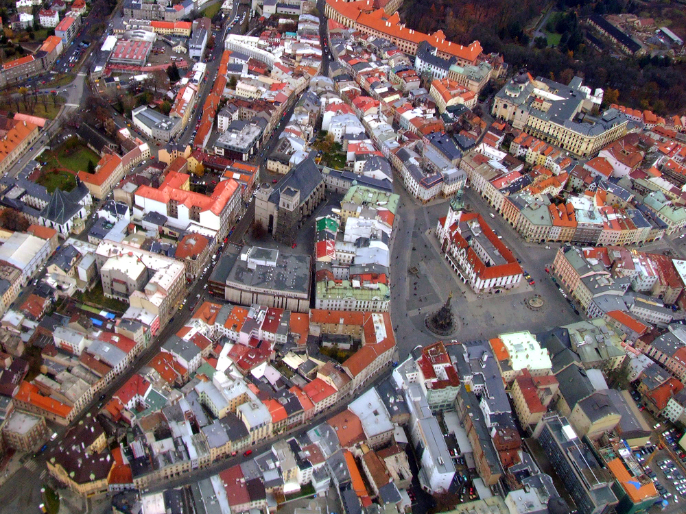 Olomouc, letecký pohled na centrum